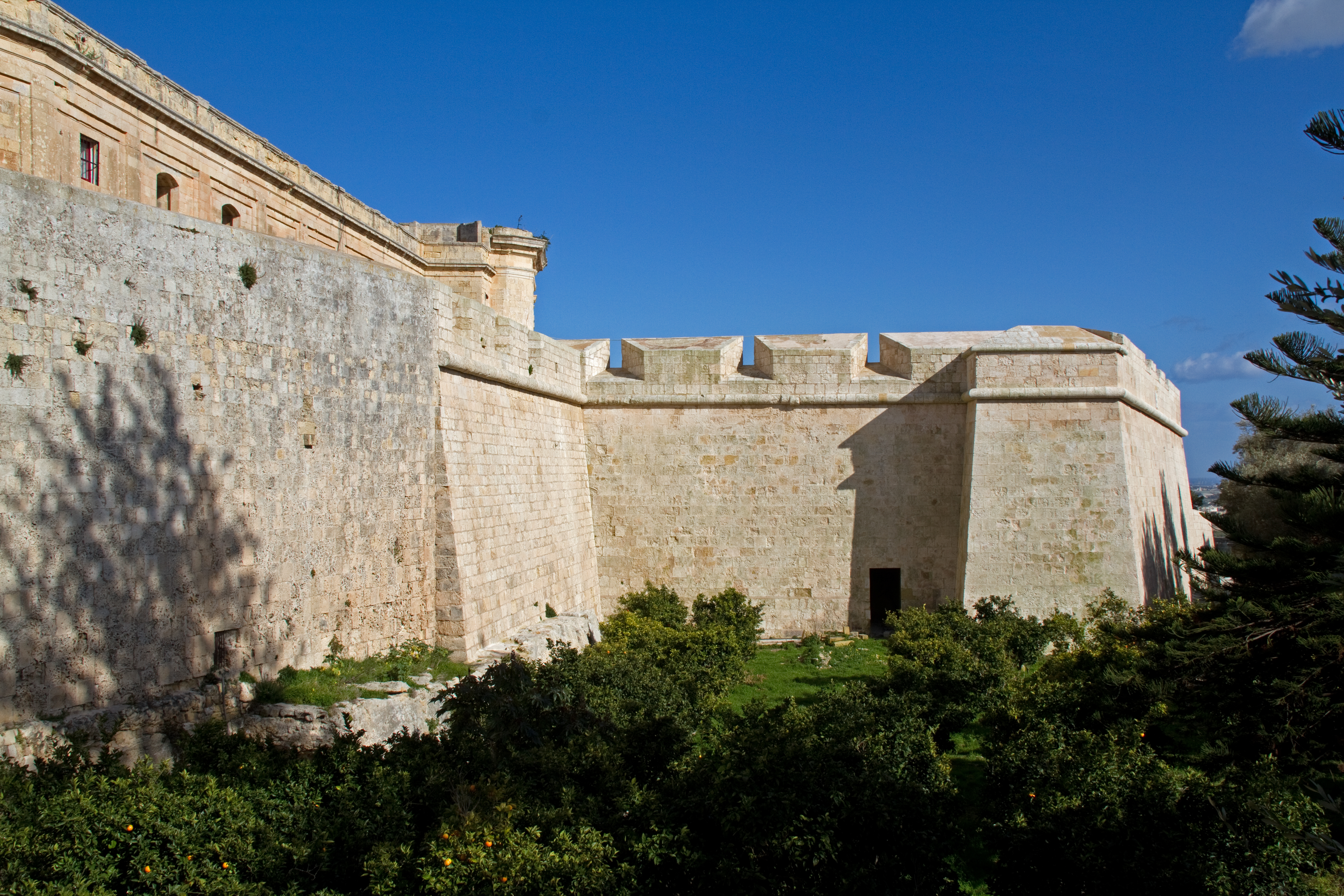 Mdina Walls